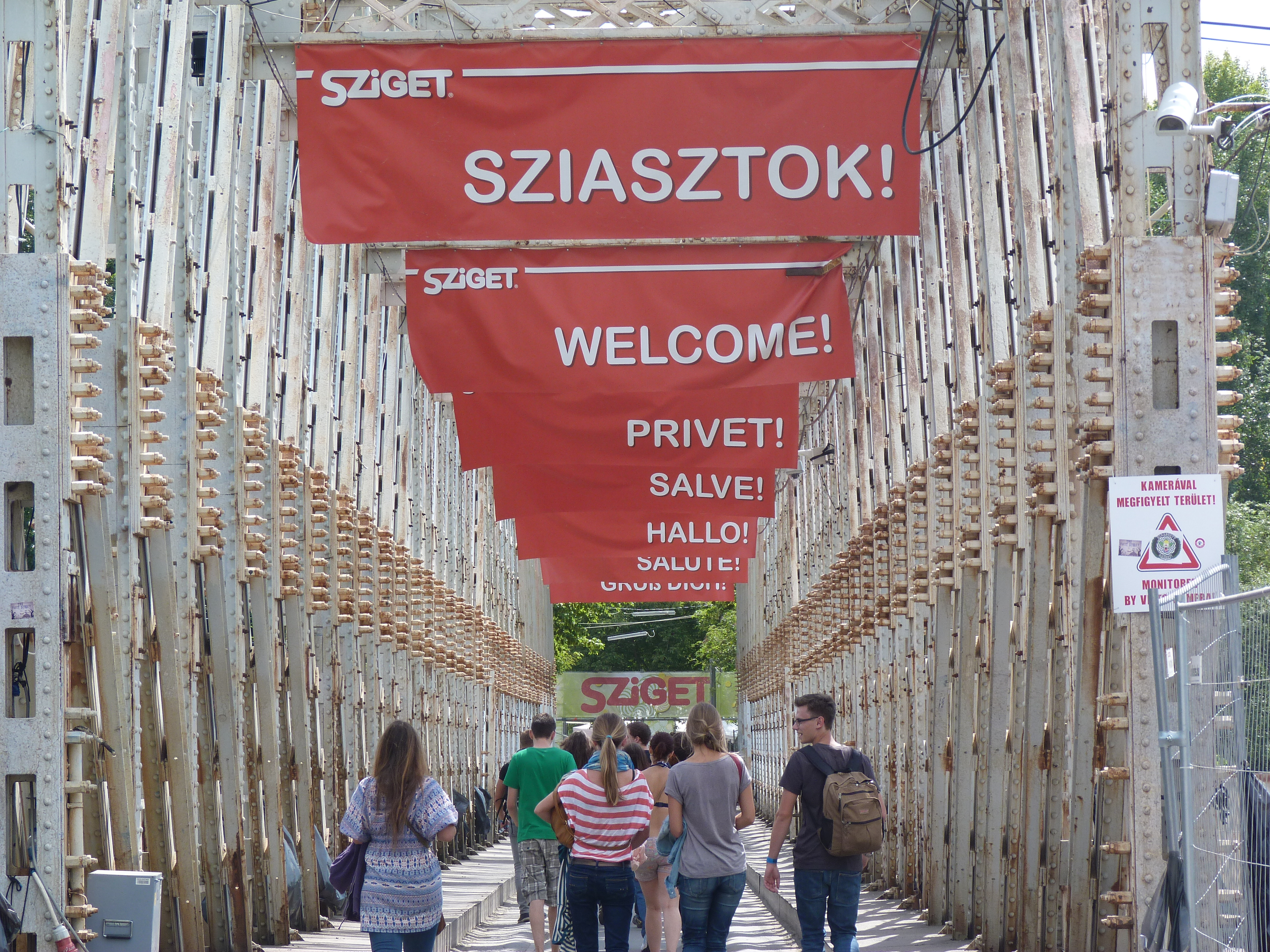 Live on the 12th of August, 2012. Budapest, the Sziget Festival. Published under Creative Commons in the Metapolisz DVD line. A felvételek 2012. Augusztus 12 –én vasárnap készültek Budapesten, a Sziget Fesztiválon. Megjelent Creative Commons alatt a Metapolisz DVD sorozatban.